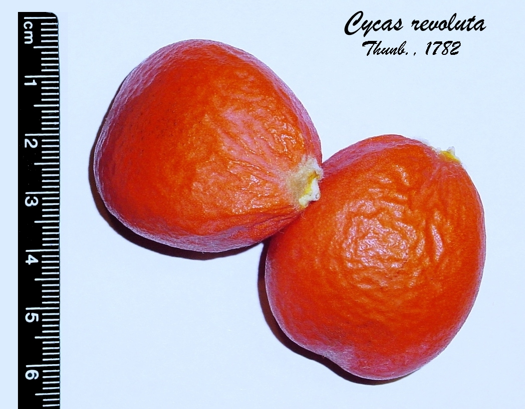 Cycas revoluta- seeds